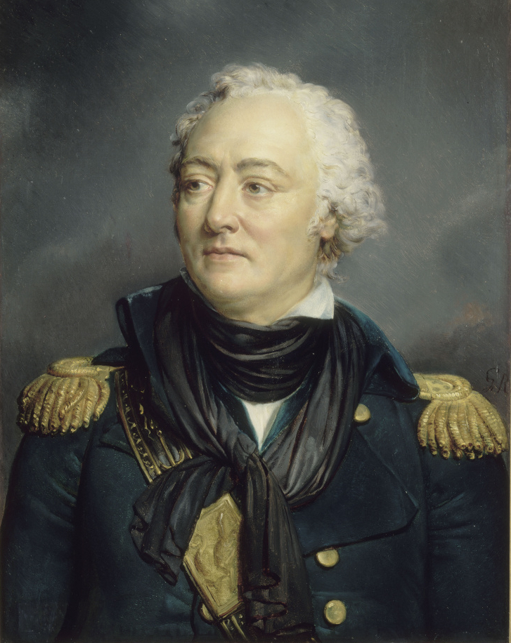 commandé par Louis-Philippe pour le musée historique de Versailles en 1835